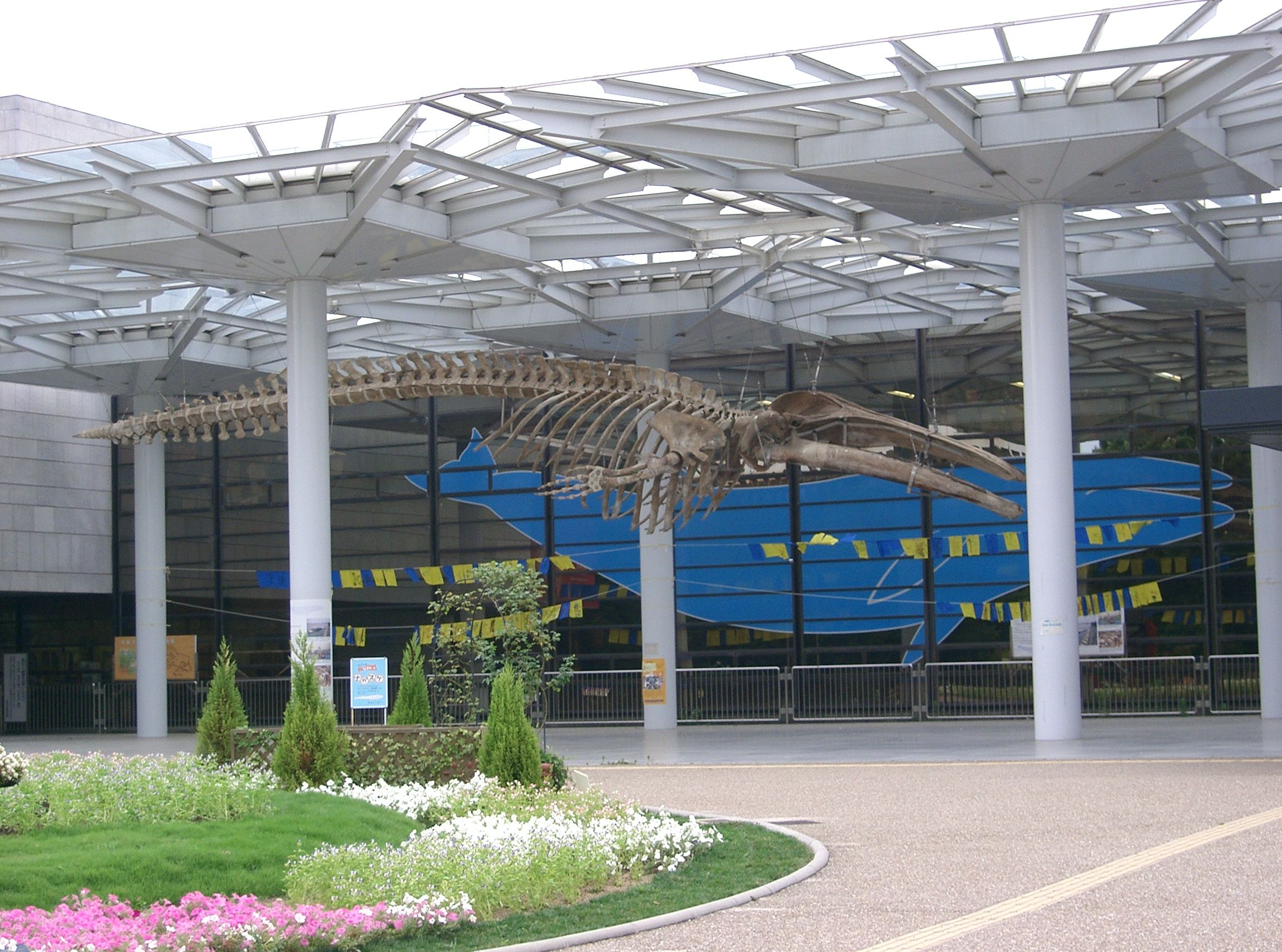 大阪市立自然史博物館のナガスクジラ骨格標本